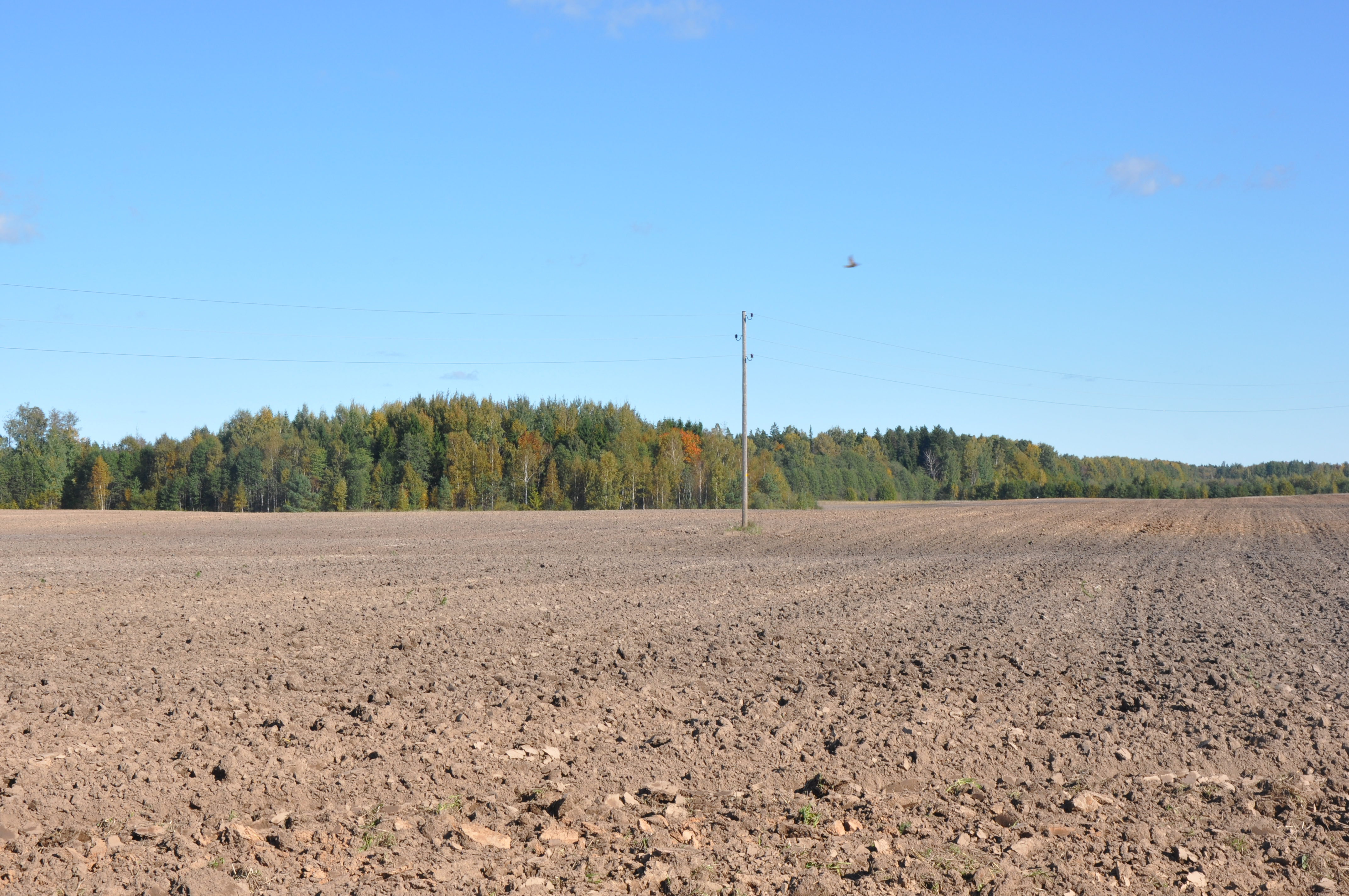 Uzarts lauks netālu no Kākciema, Kākciems, Ropažu pagasts, Ropažu novads, Latvia